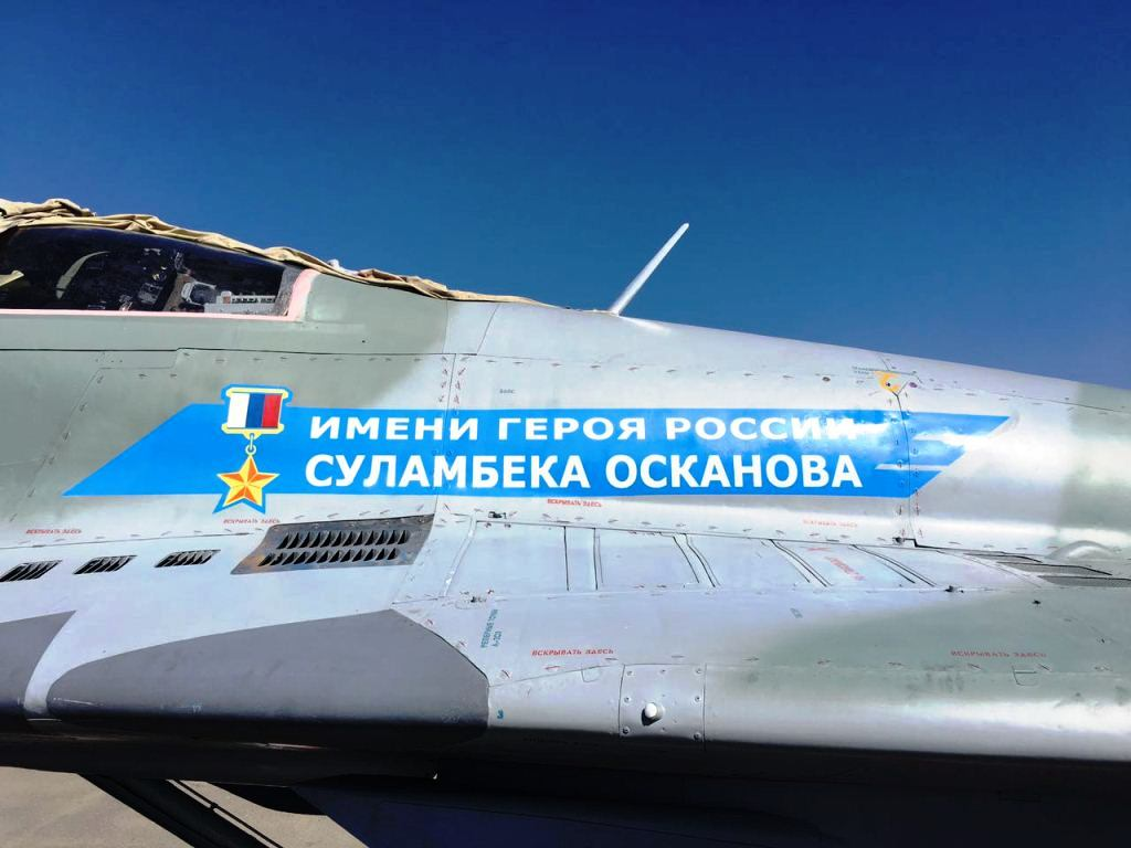 МиГ-29, носящий имя Героя России генерал-майора Суламбека Осканова